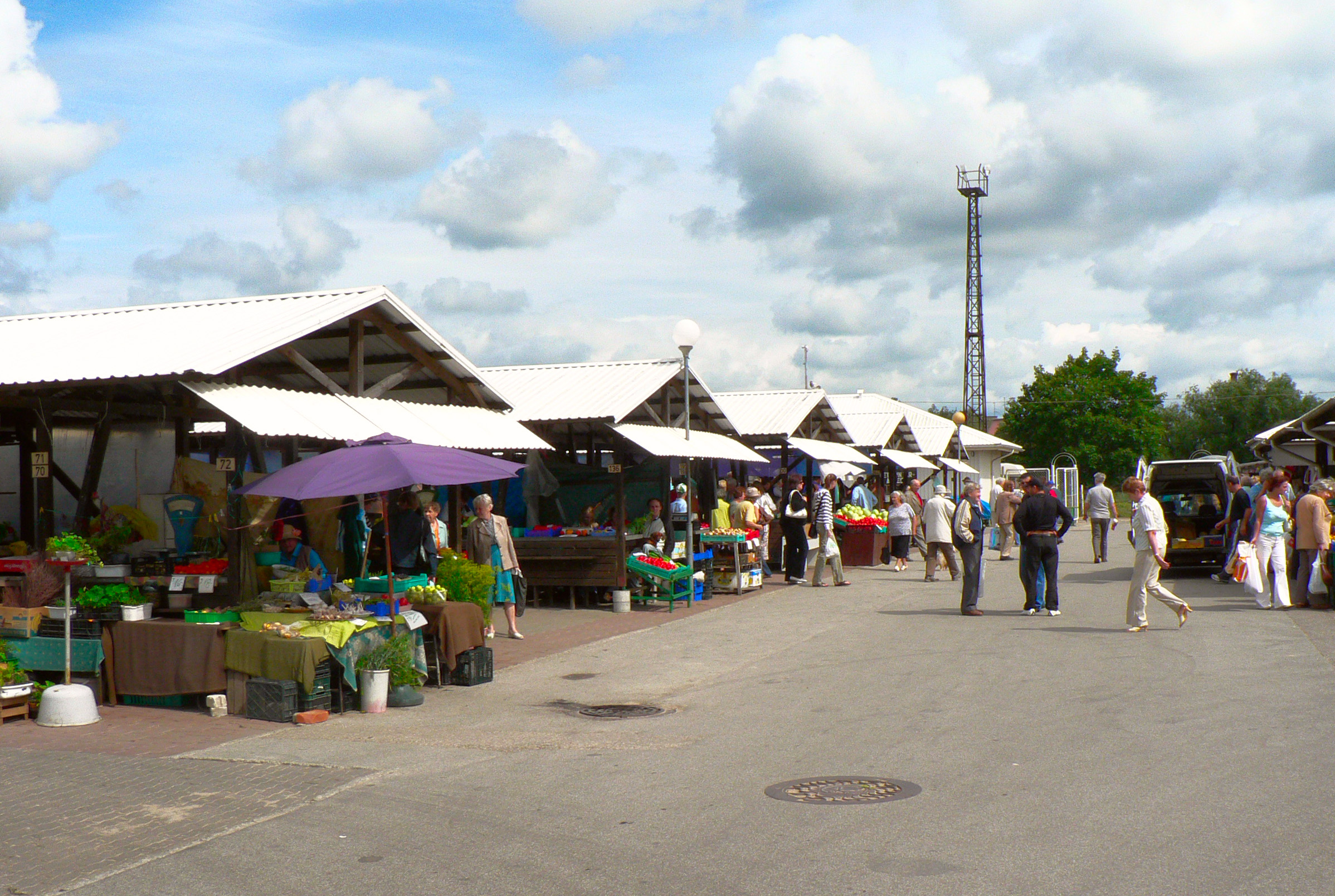 Tartu avaturg